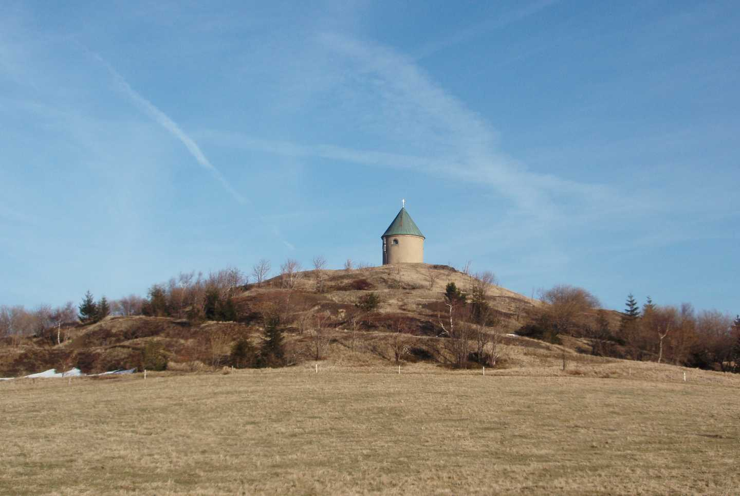 Kaple Neposkvrněného početí Panny Marie na vrcholu Mědníku, Krušné hory